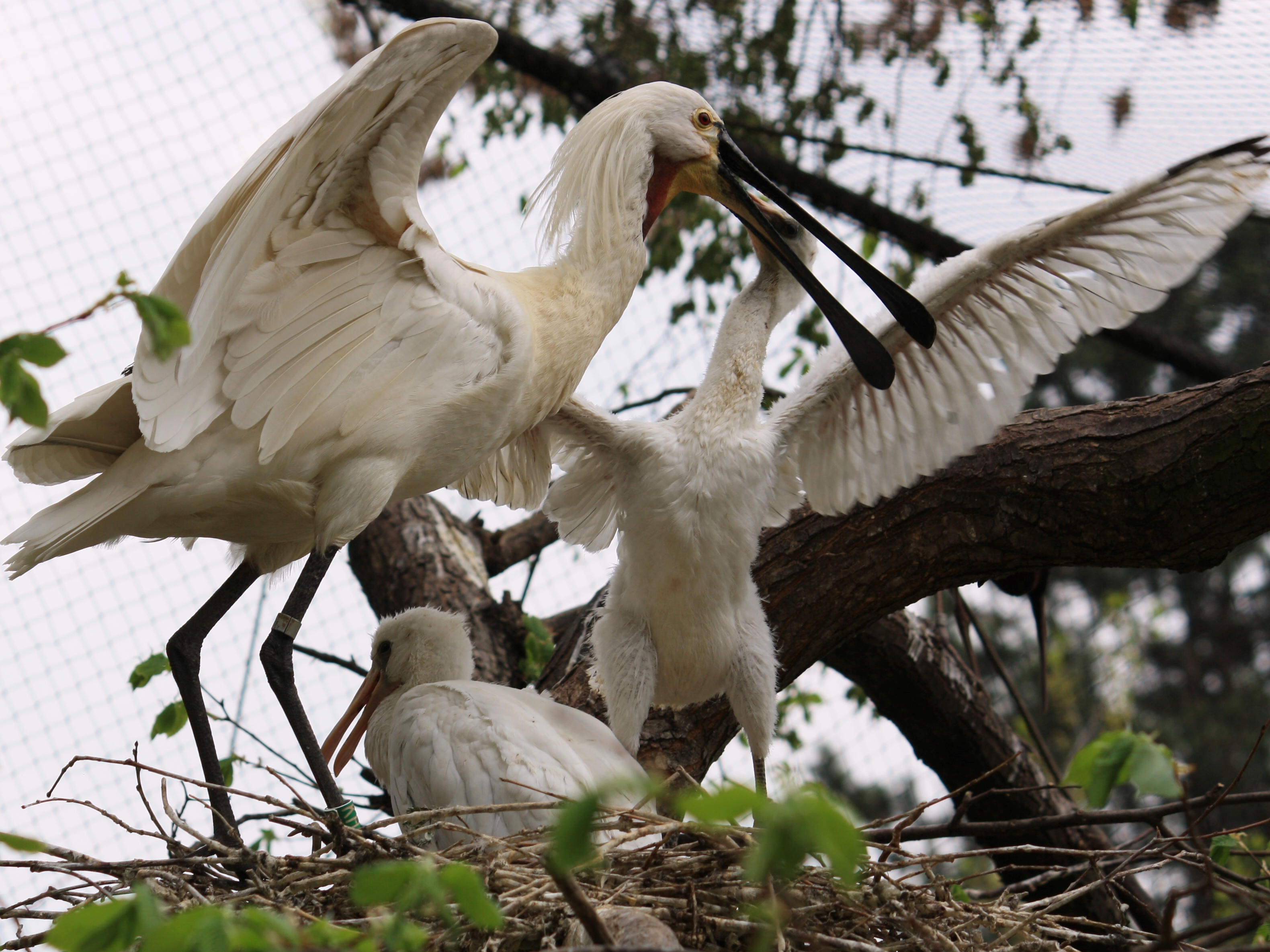 Kolpík bílý na hnízdě - krmení mláďat Samice snáší 4 až 5 vajec bílé barvy. O mláďata se starají oba rodiče, krmení probíhá asi dva měsíce. V Pražské zoo umístěni v průchozí voliéře a hnízdění je tak možné pozorovat bez mříží z několika metrů.